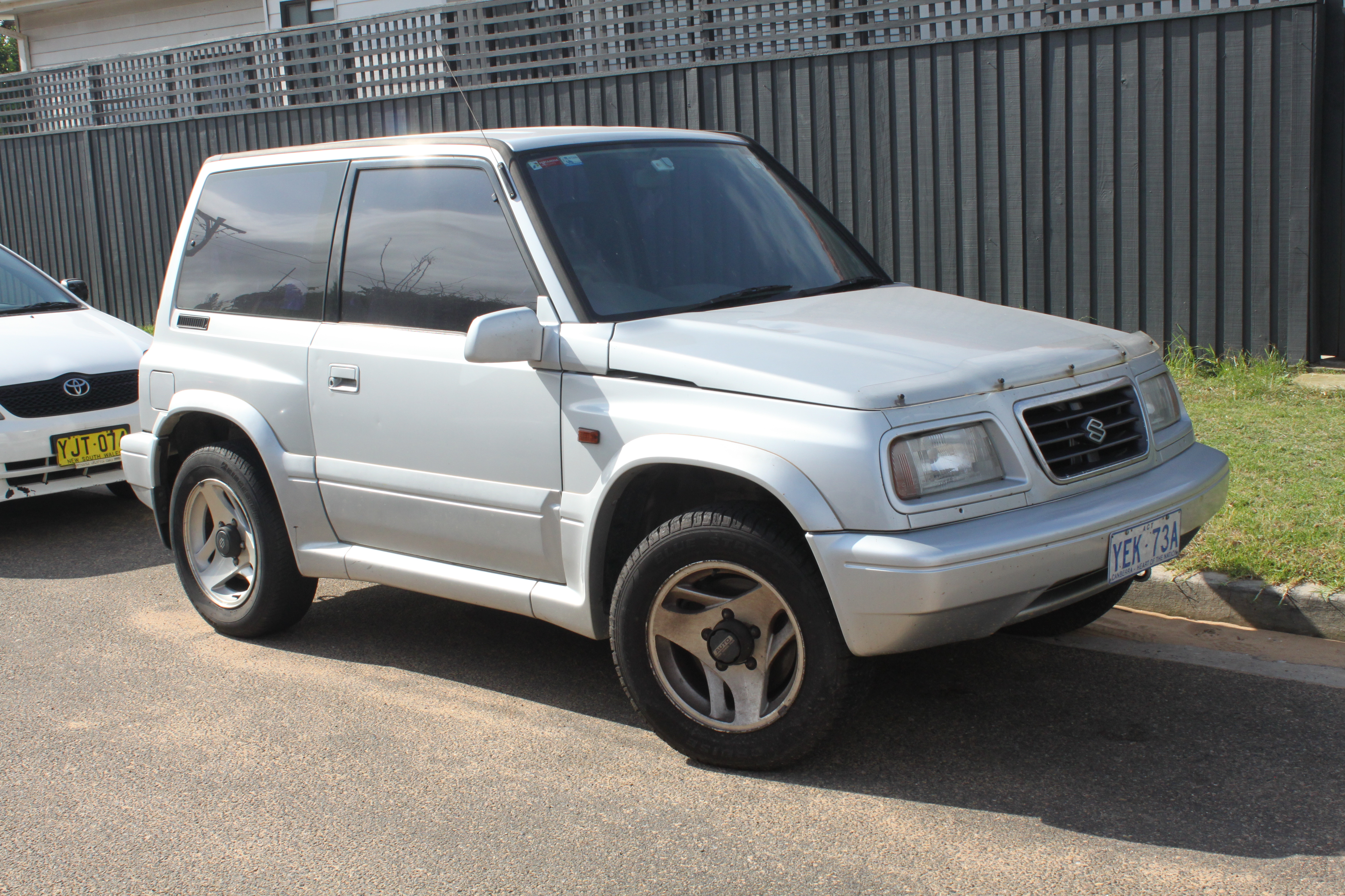 Suzuki Vitara SV420G JLX